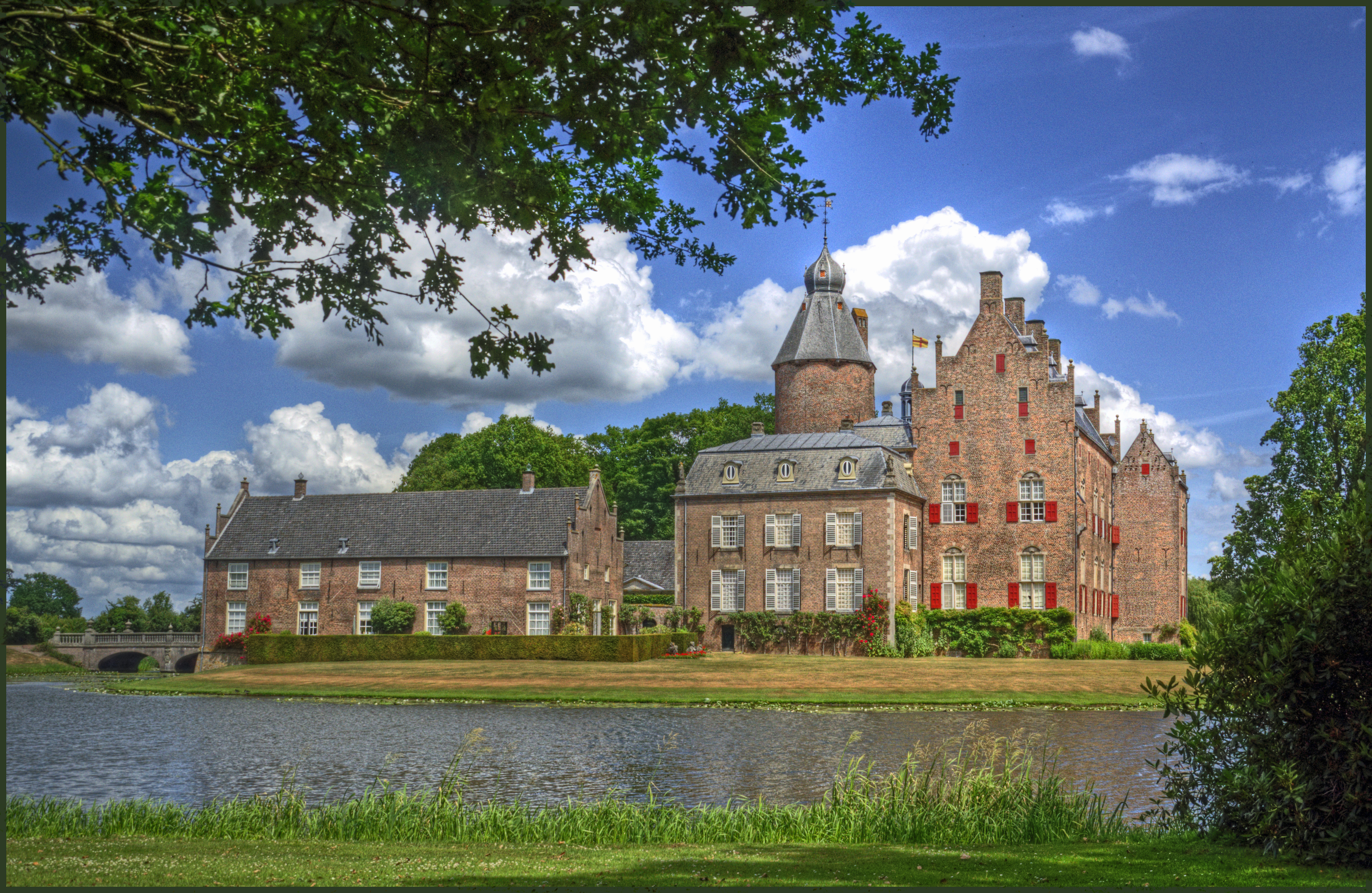 Kasteel Rechteren (provincie Overijssel, Nederland).